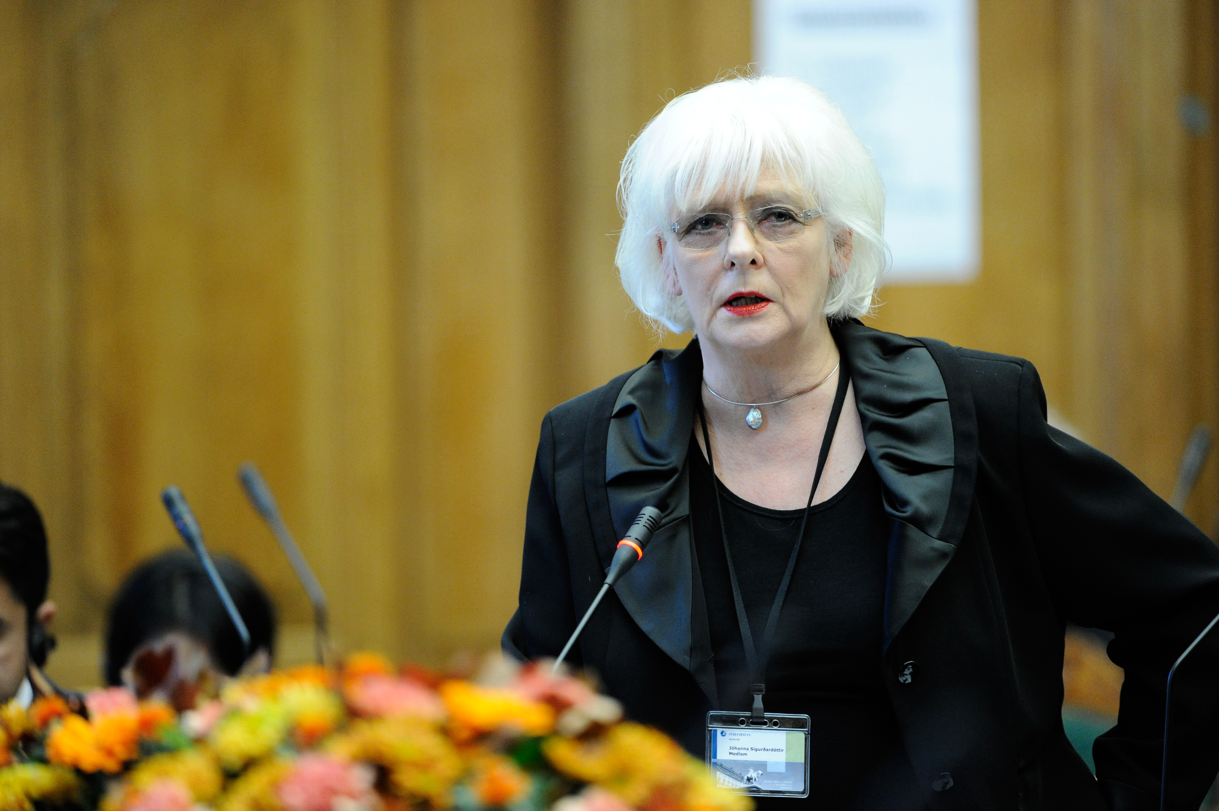 Jóhanna Sigurðardóttir, statsminister Island. Nordiska rådets session 2011 i Köpenhamn